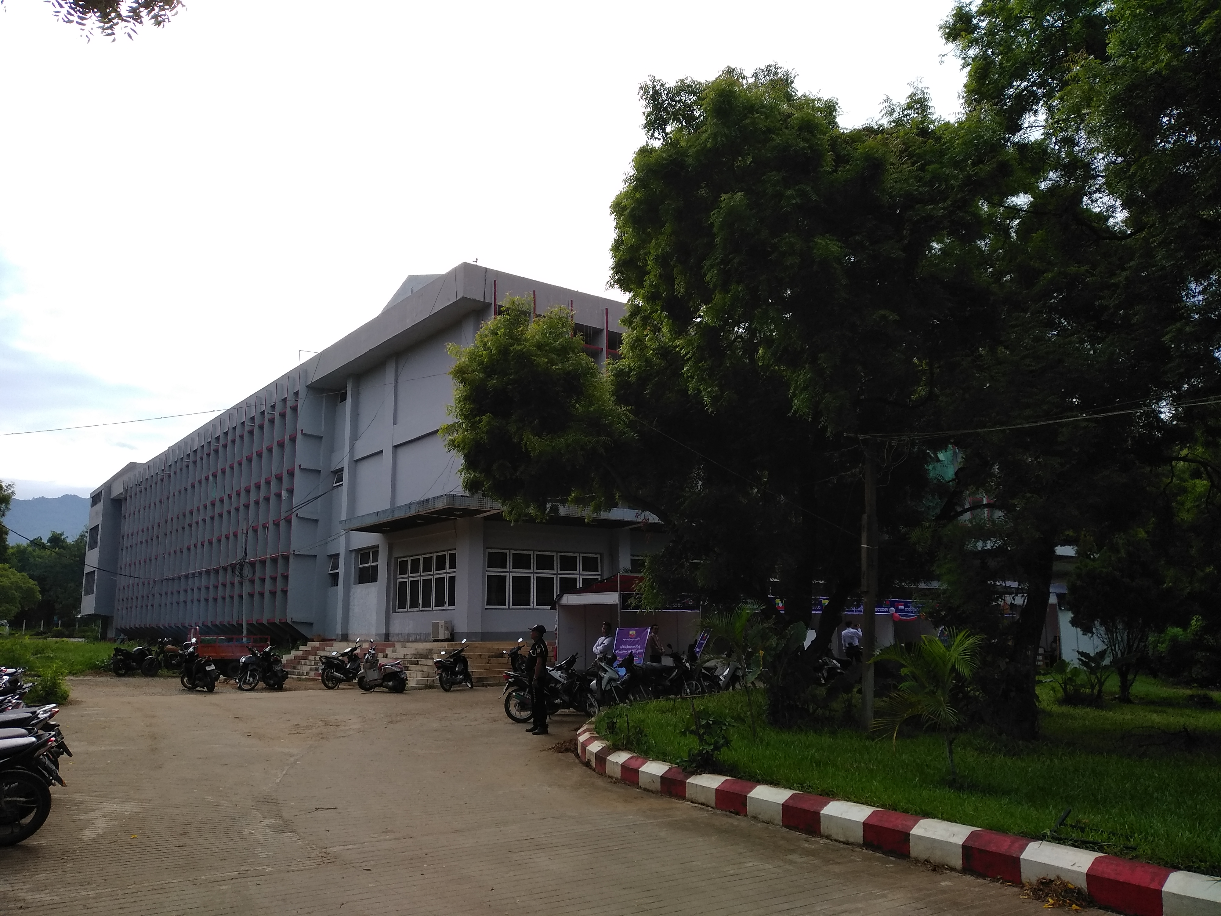 MTU.ပင်မဆောင်